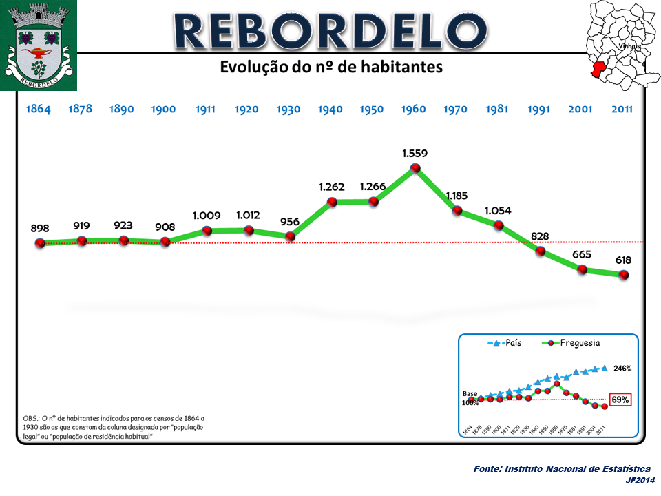 Evolução da População 1864 / 2011